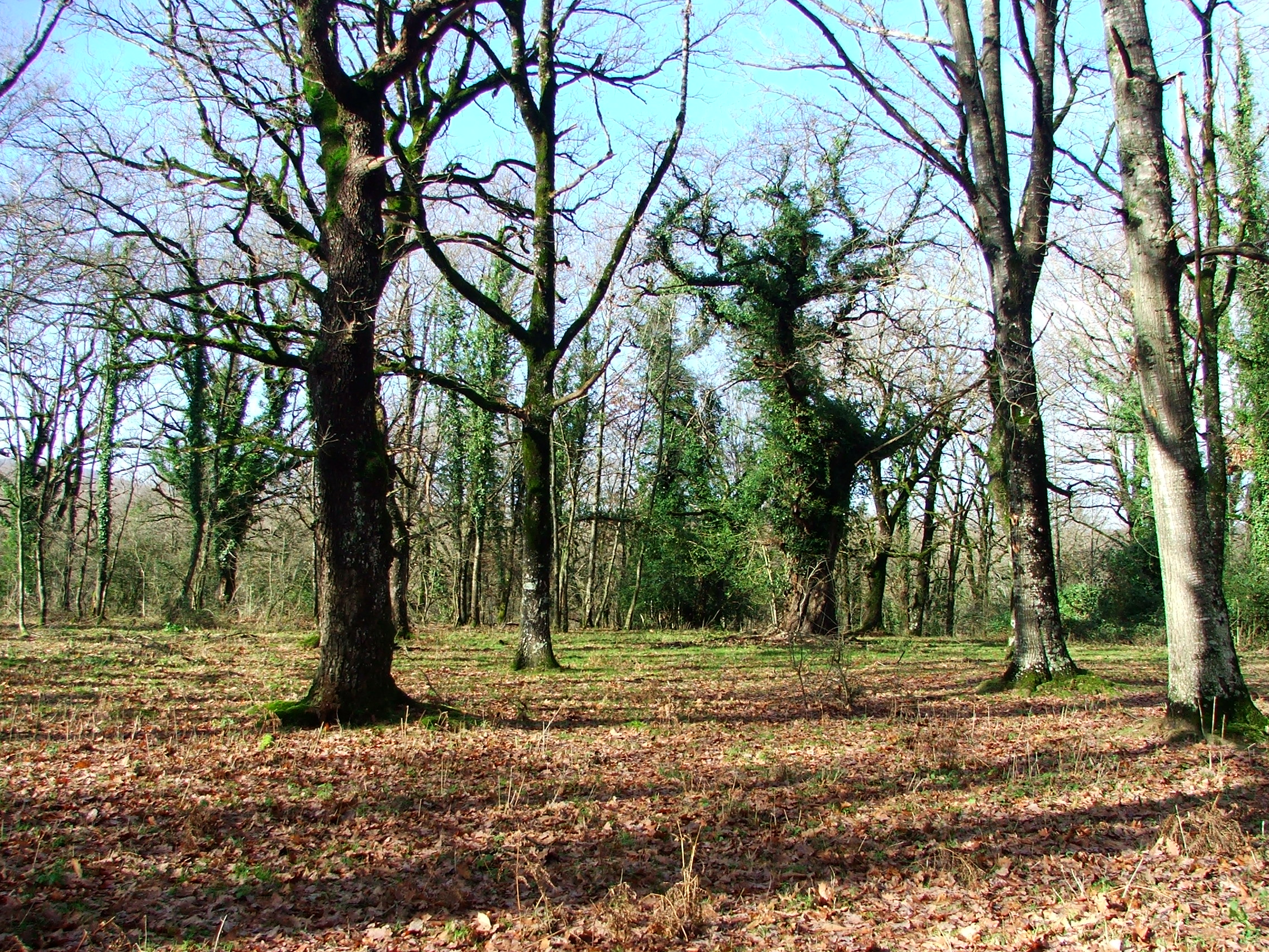 Maibelo in Altsasu